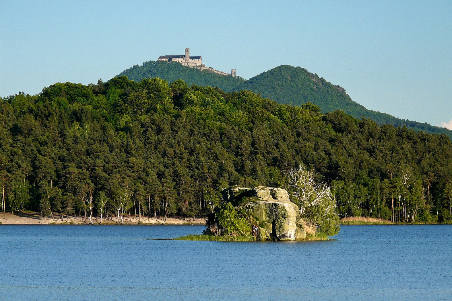 Máchovo jezero, ostrov Myšlín, Kluček, Bezdězy